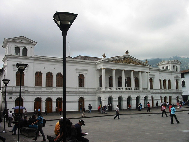 Edificio y plaza del Teatro Nacional Sucre, en el centro histórico de la ciudad, Quito.